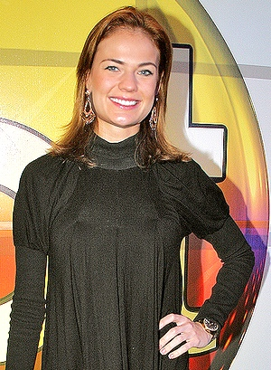 Thais Pacholek no SBT